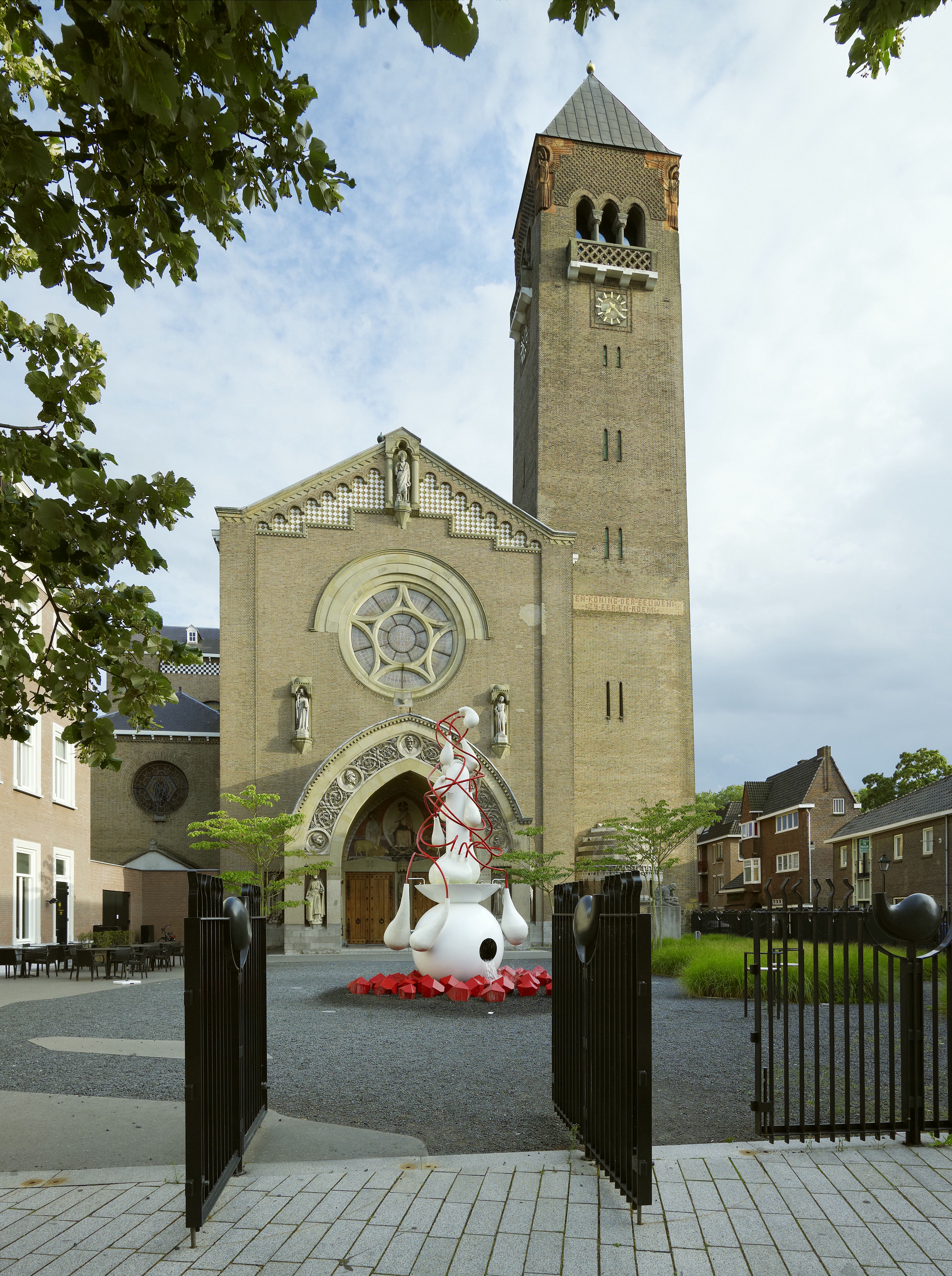 Sint Jacobskerk: Overzicht westgevel met ingangspartij en klokketoren